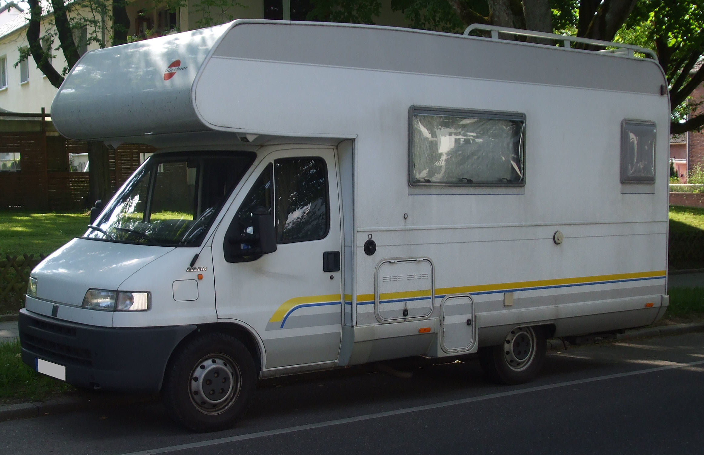 Bürstner-Wohnmobil A 572